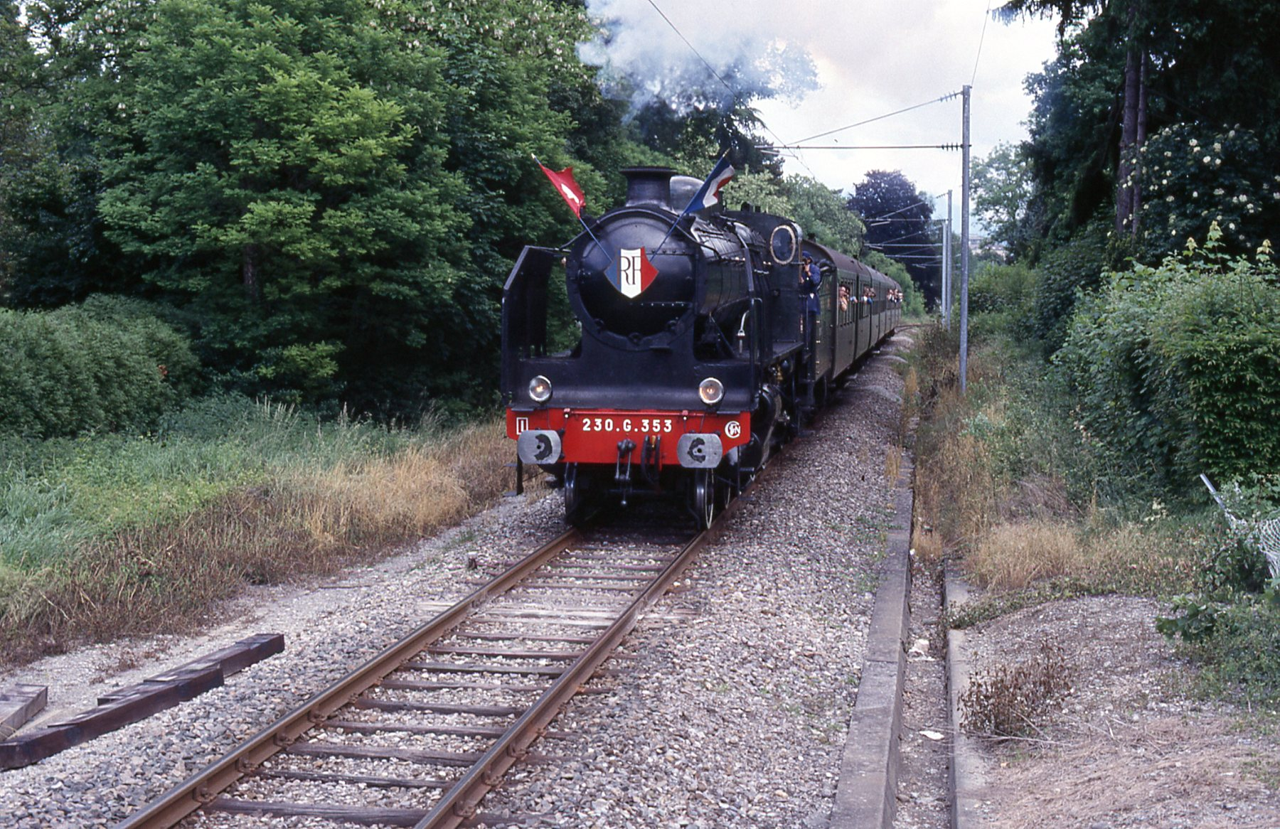 Photo: Trams aux Fils. En ligne, hauteur de la Gradelle, le 28 mai 1988, jour du centenaire de la ligne.